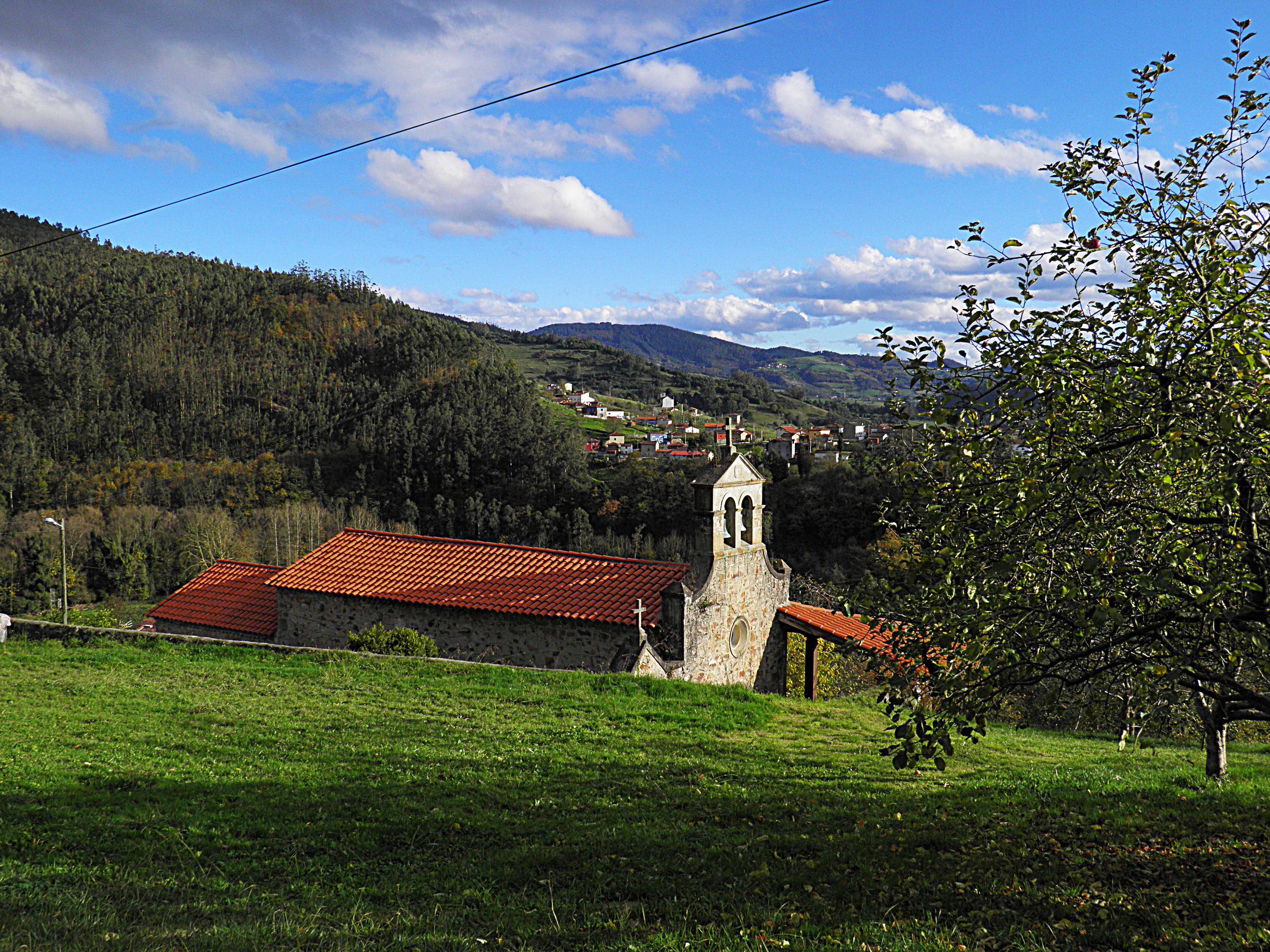 Pronga (Pravia, Asturias)